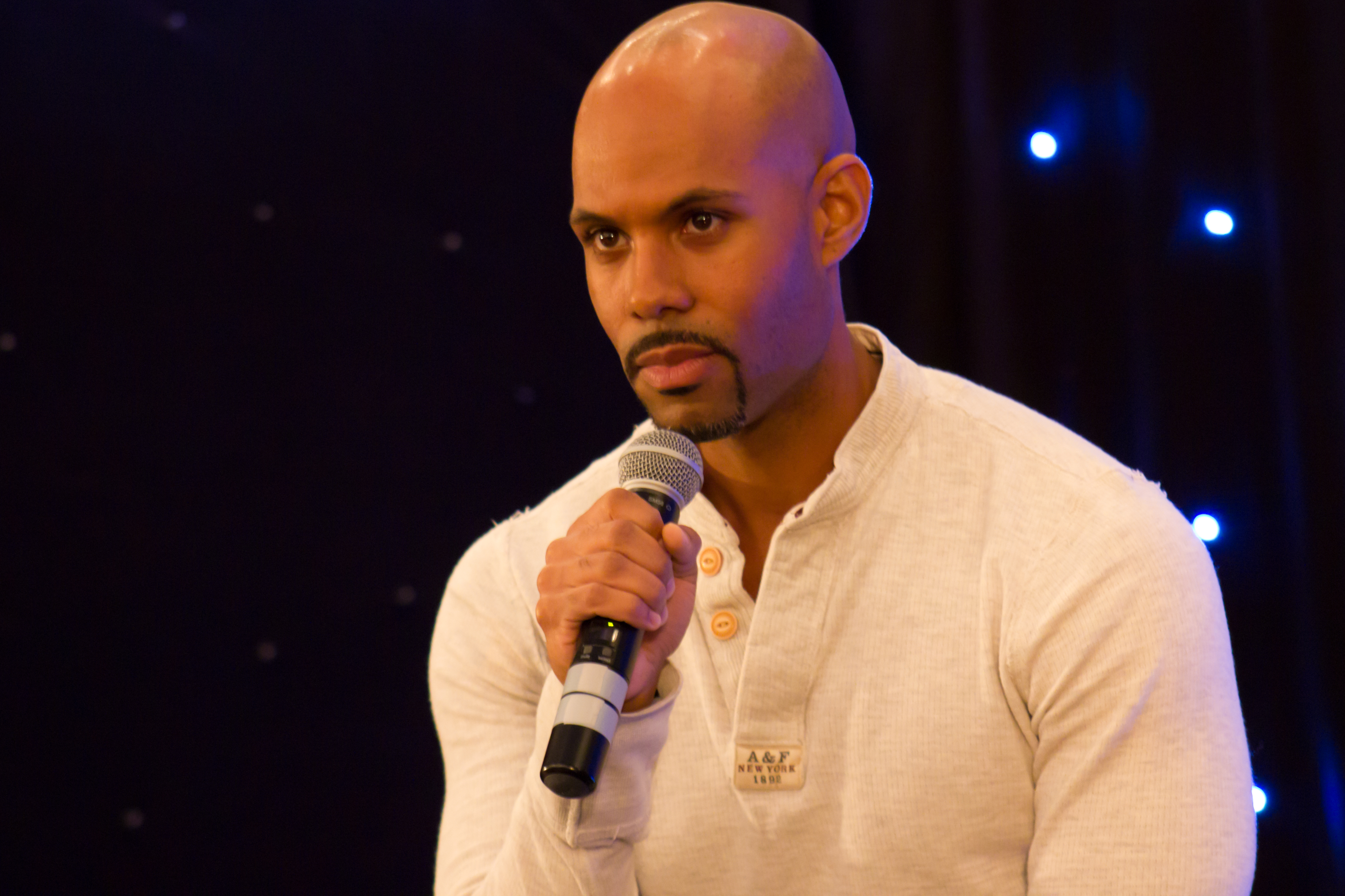 Todd Williams